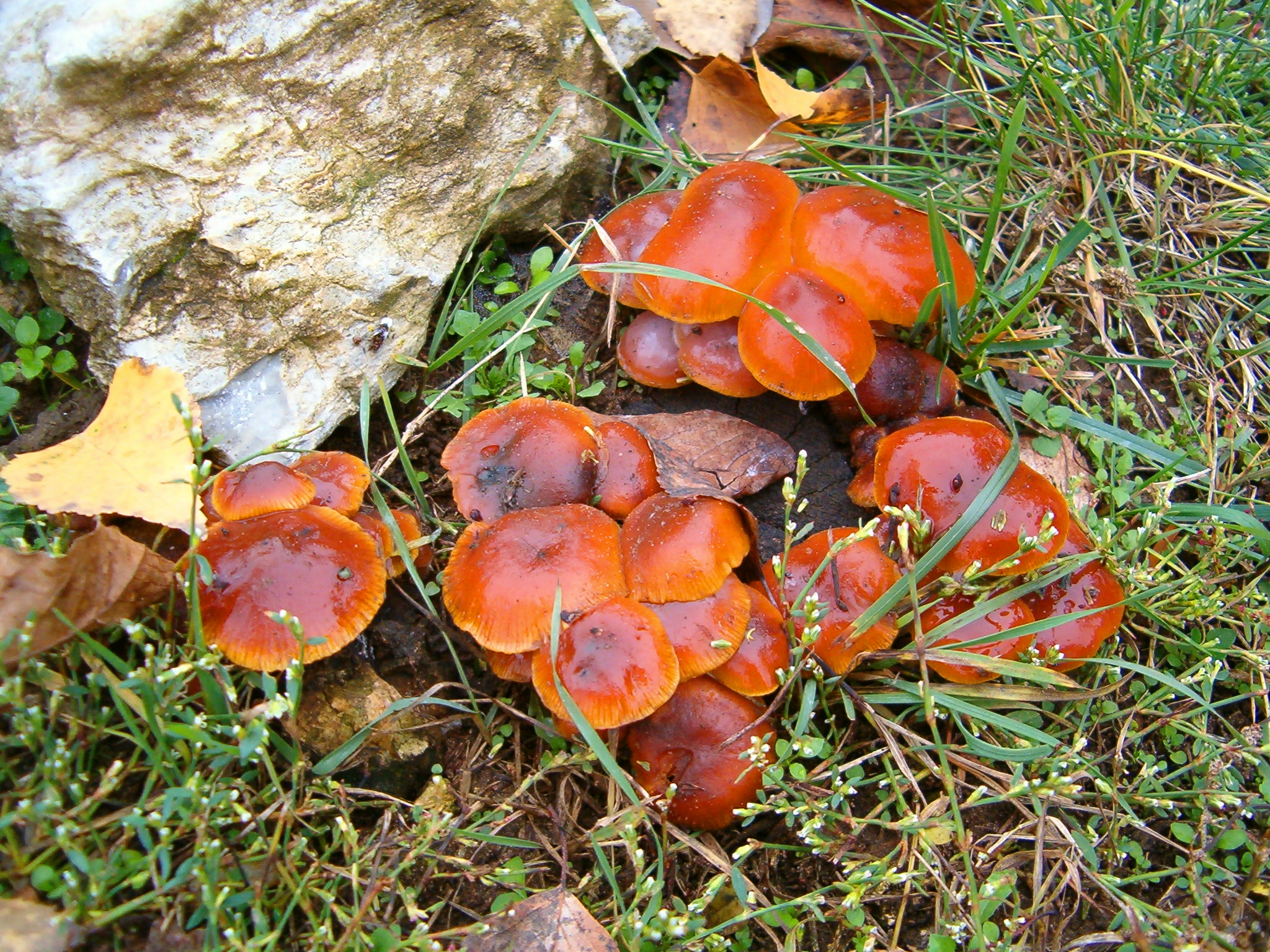 Flammulina velutipes